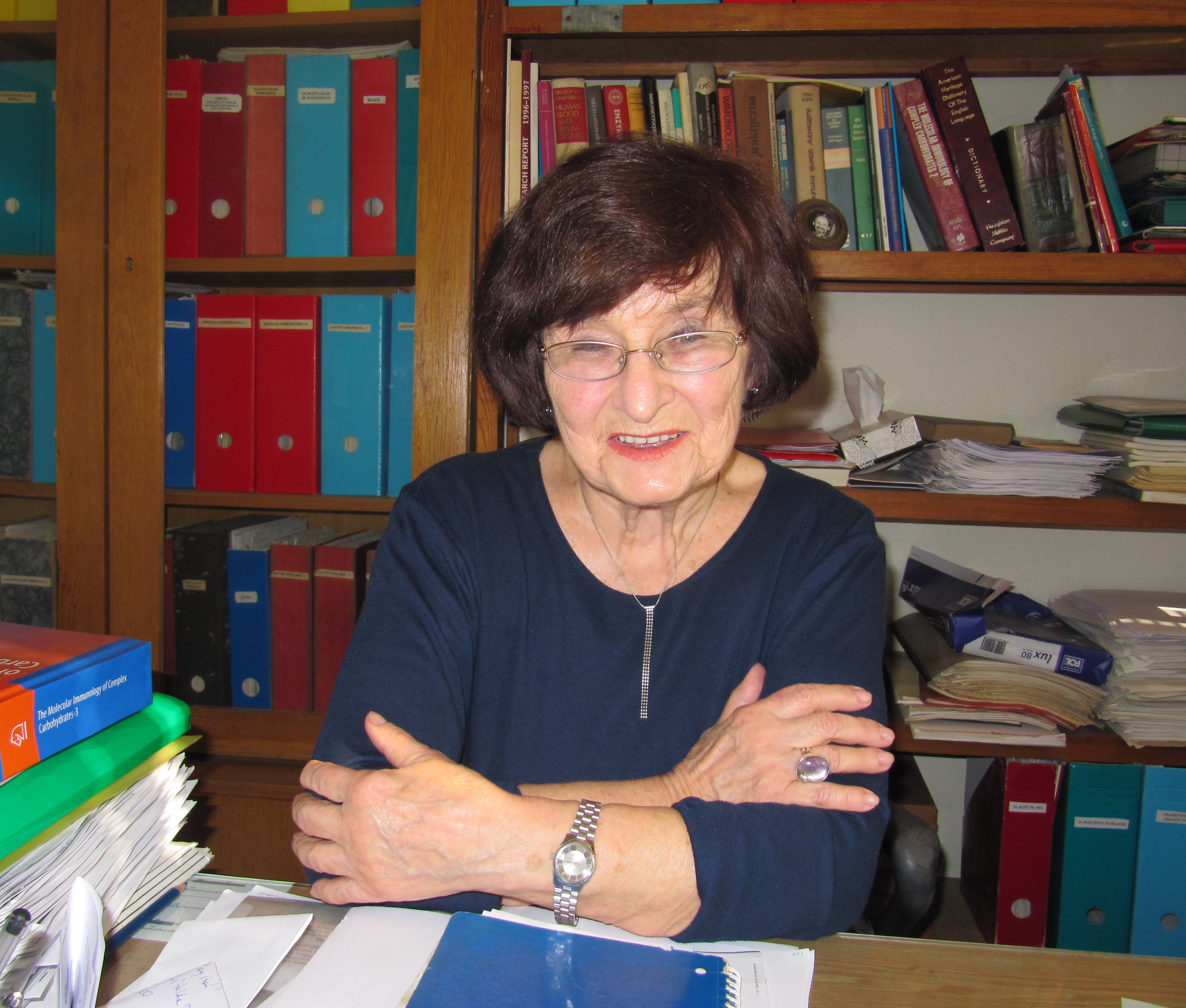 Prof. Elwira Lisowska